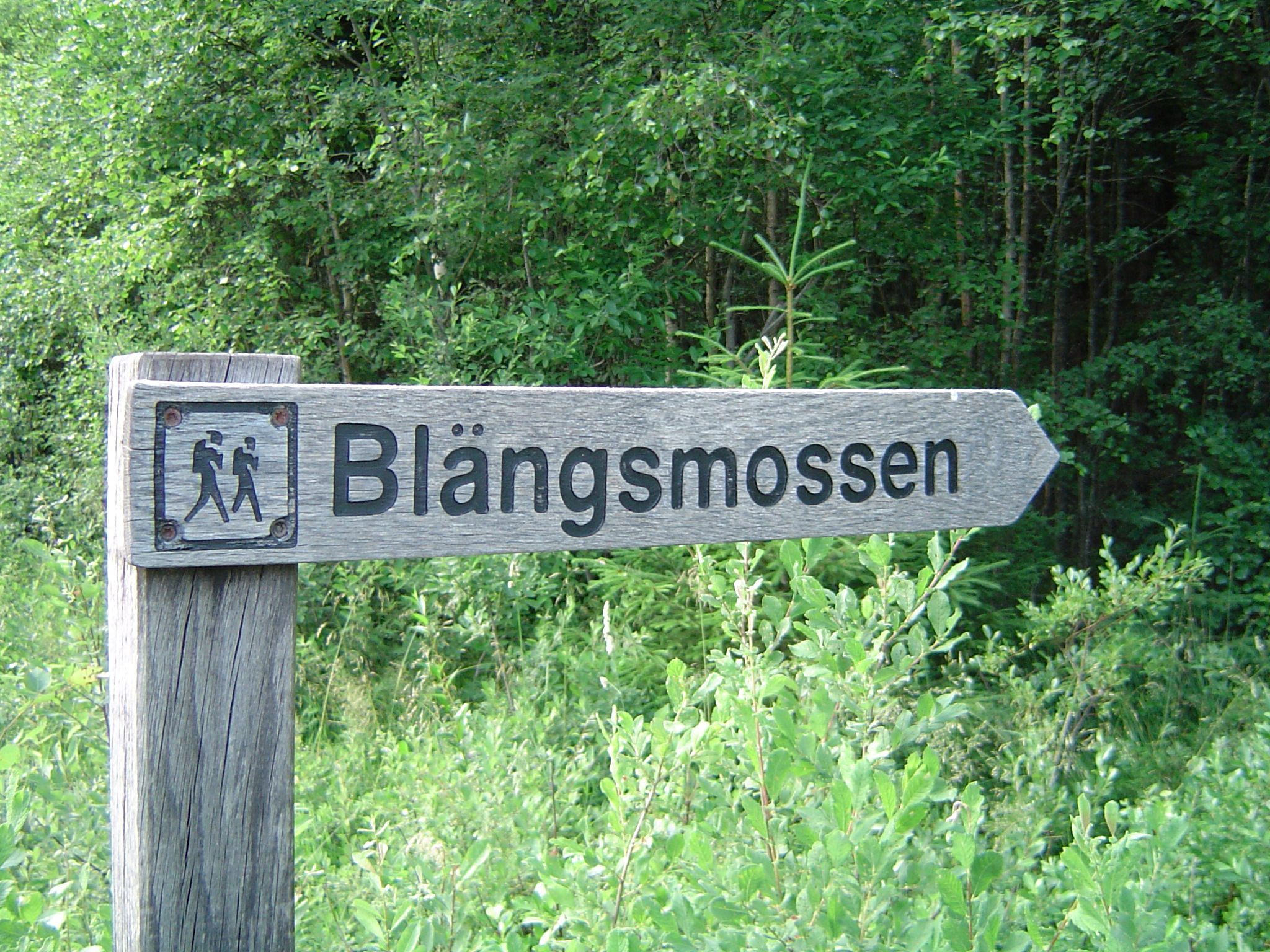 Houten bord naar Blängsmossen